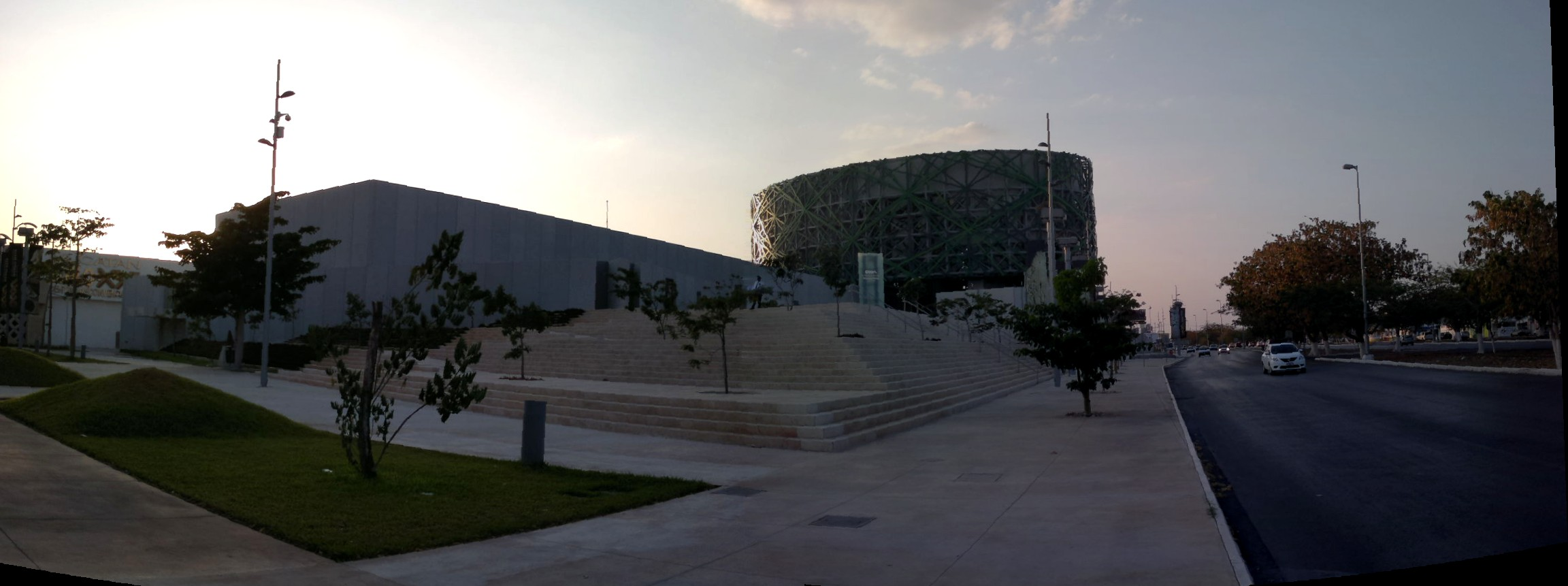 Vista panorámica del Gran Museo del Mundo Maya de Mérida.